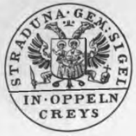 Altes Siegel bzw. Stempel der Gemeinde Straduna im Kreis Oppeln.